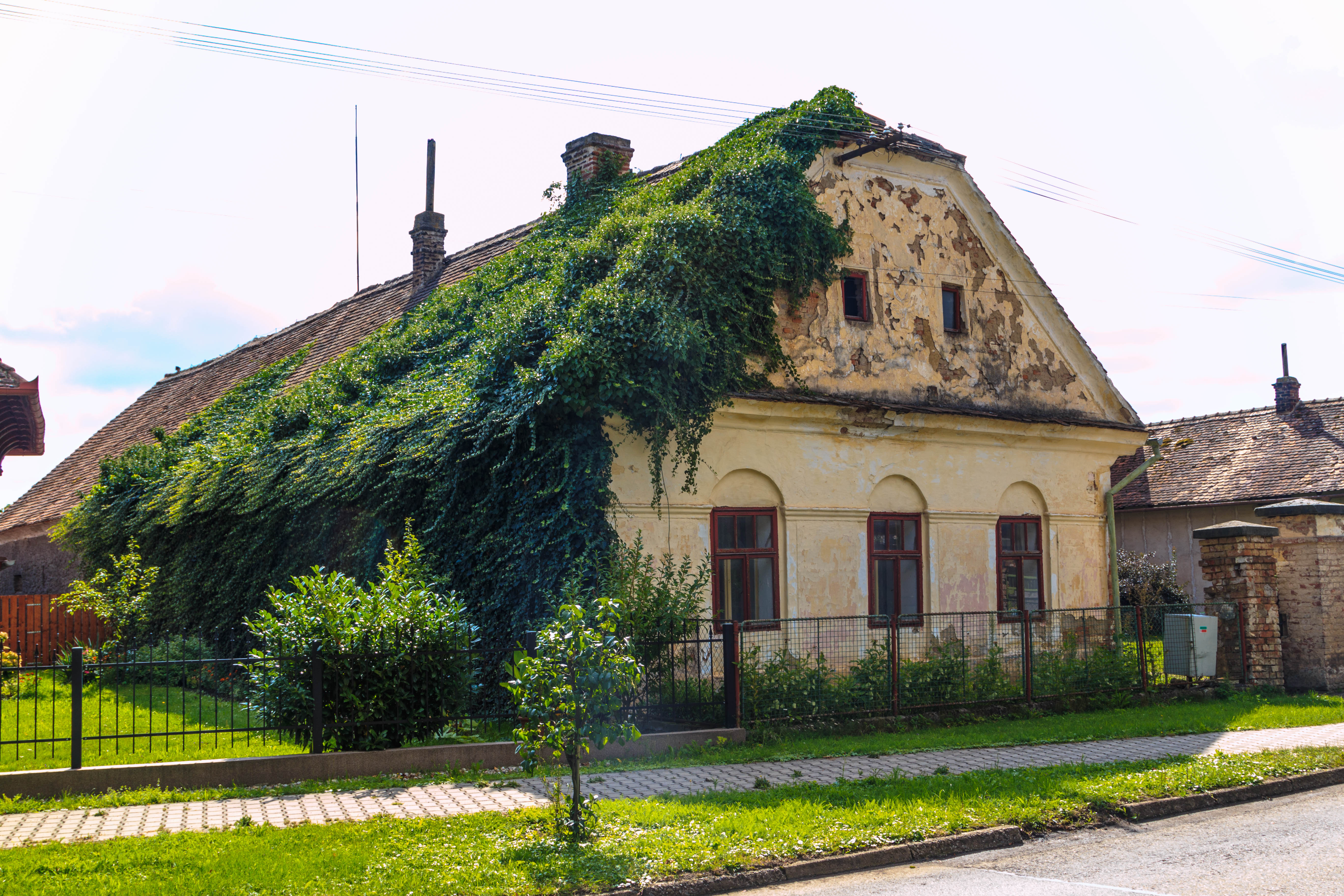 Dům čp. 22, Jezbořice 22, náves, Jezbořice.